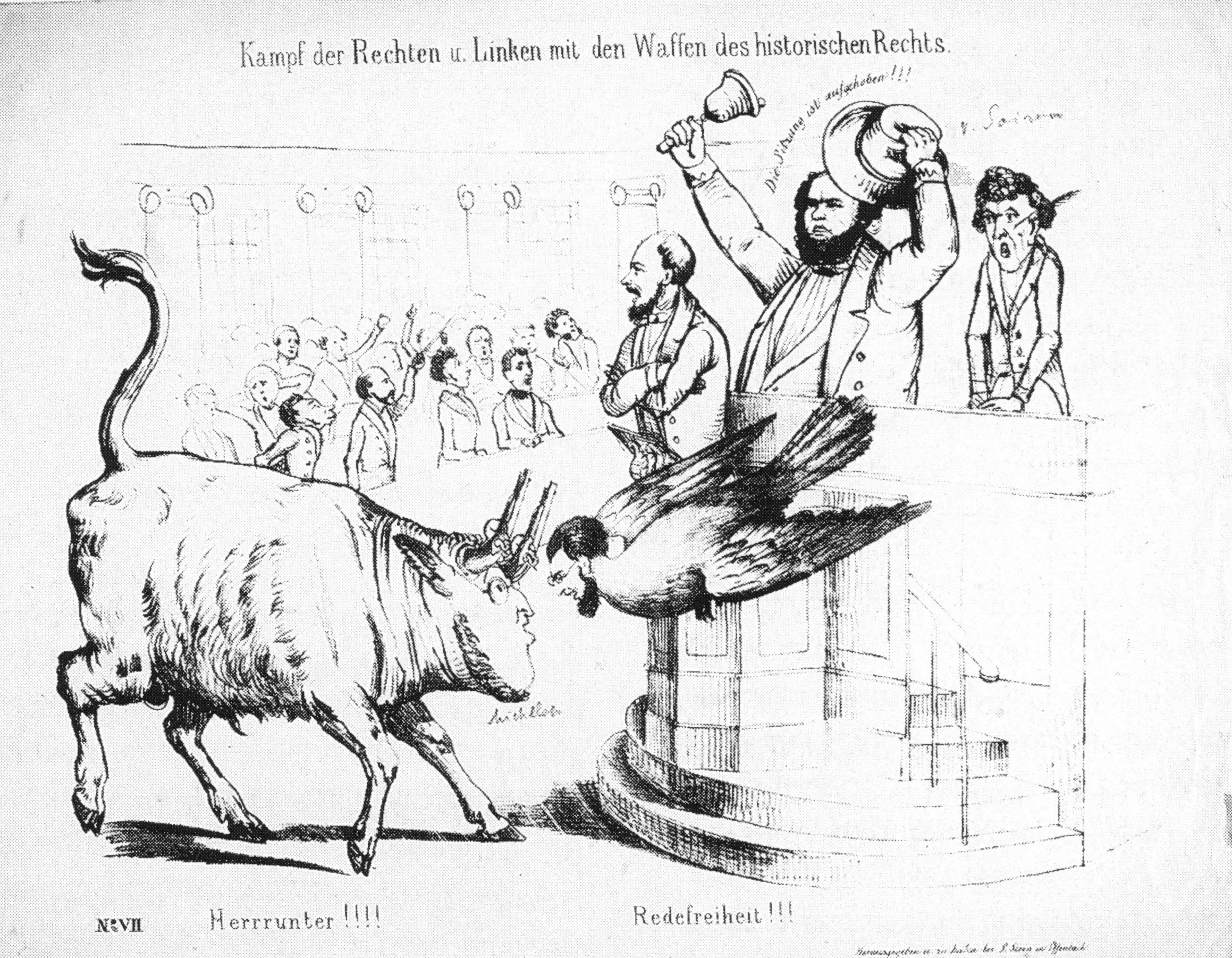 Lithographie, 1848. “Kampf der Rechten u. Linken mit den Waffen des historischen Rechts”. Vizepräsident der Nationalversammlung mit Glocke: Alexander von Soiron, rechts von ihm Vizepräsident Friedrich von Hermann, links von ihm der Linke Lorenz Brentano. Der Konservative Georg von Vincke als Stier, als Vogel Adolf Rösler. Hintergrund war die Frage, ob es eine Amnestie für die badischen Aufständischen geben sollte (Debatte vom 8. August 1848).